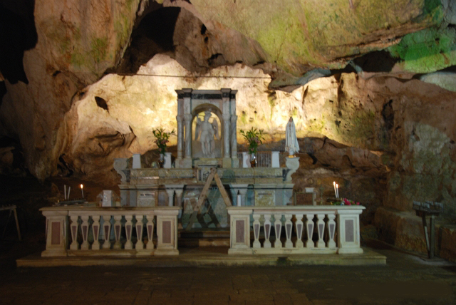 Cagnano Varano: Grotta di San Michele, altare principale.